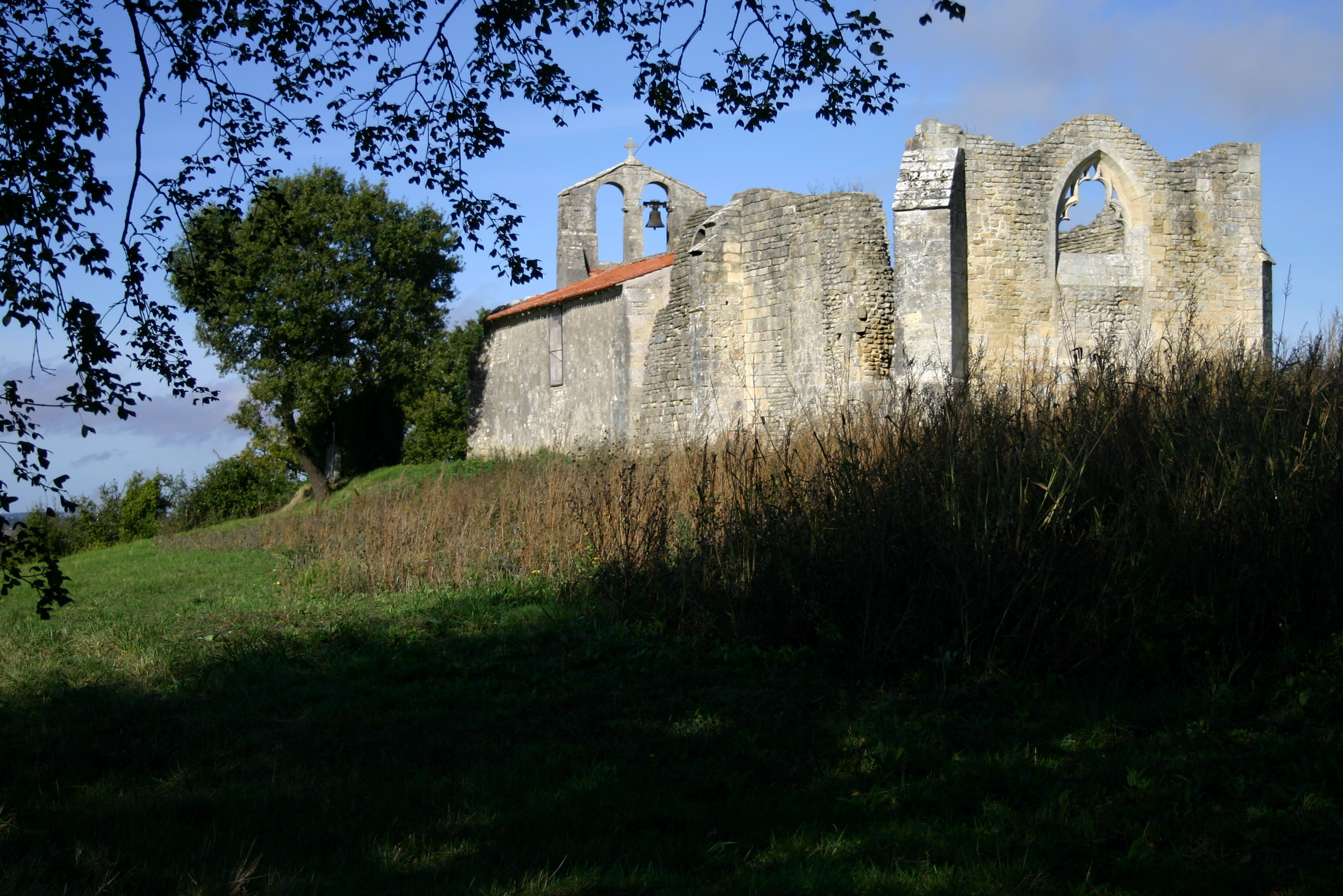 Église Saint-Pierre de Puyrolland